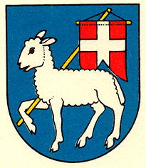 Wappen von Forel sur Lucens